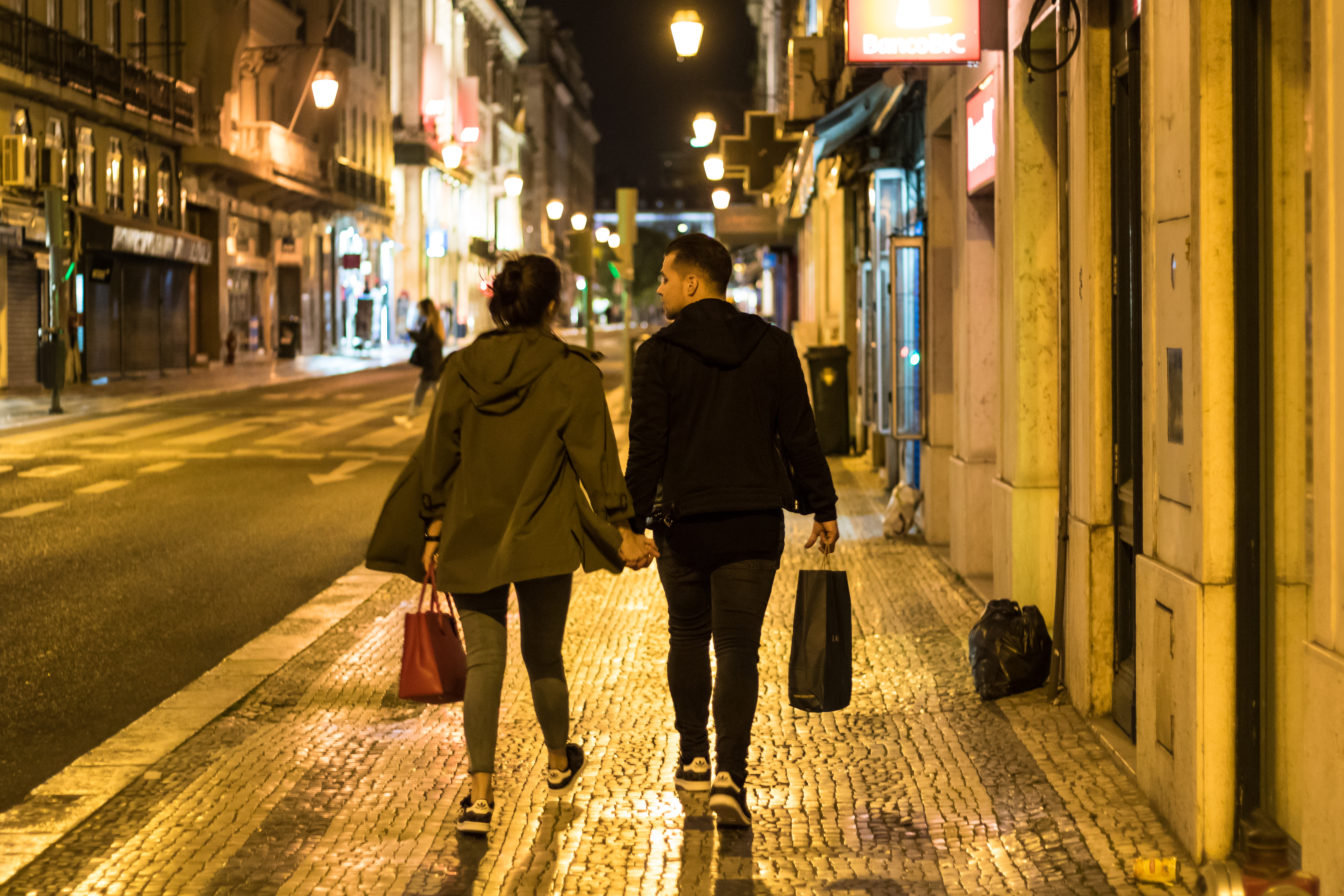 Holding hands